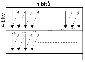 Obrázek k článku JPEG2000 (schema uspořádání bitů)